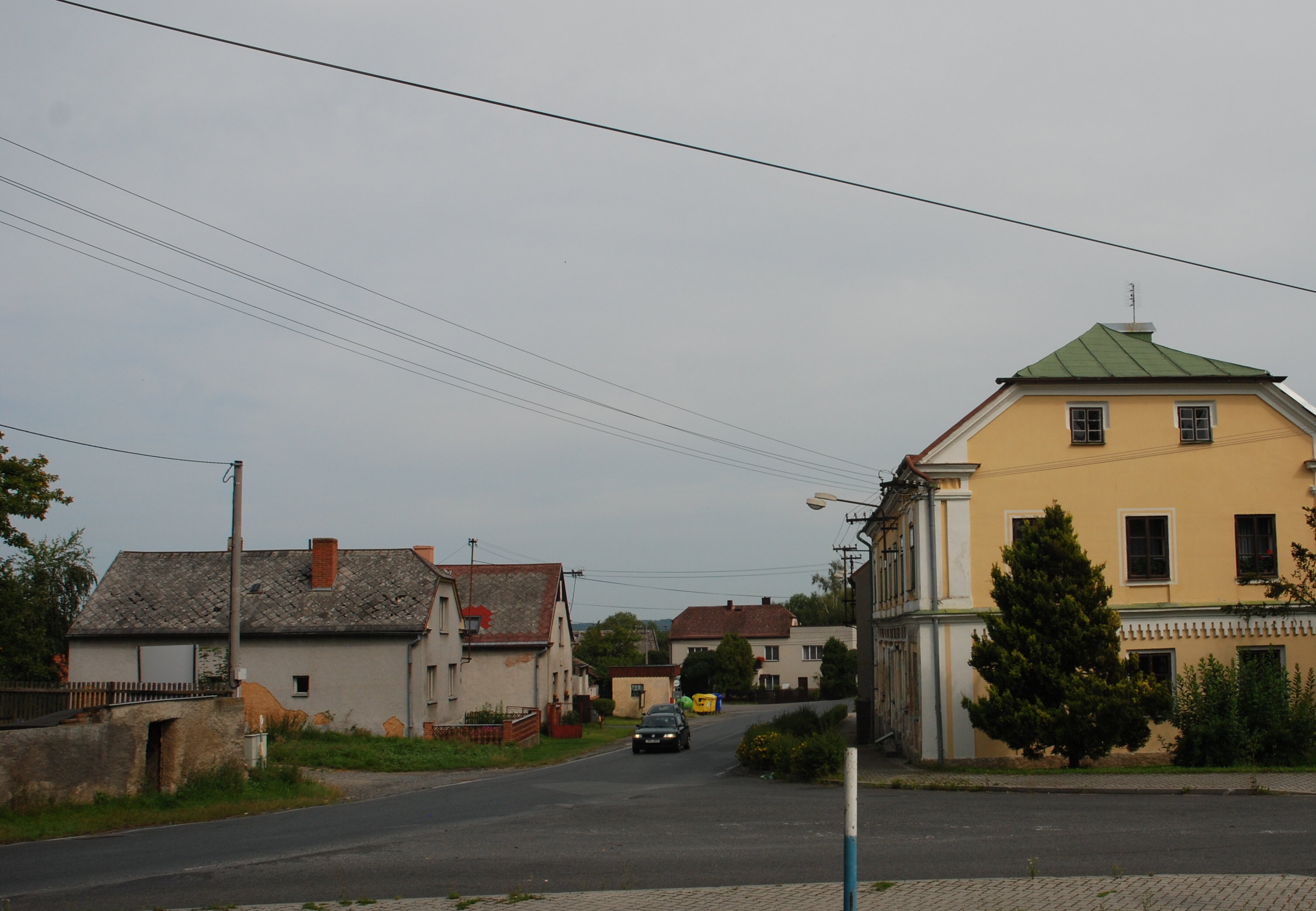 Tisová